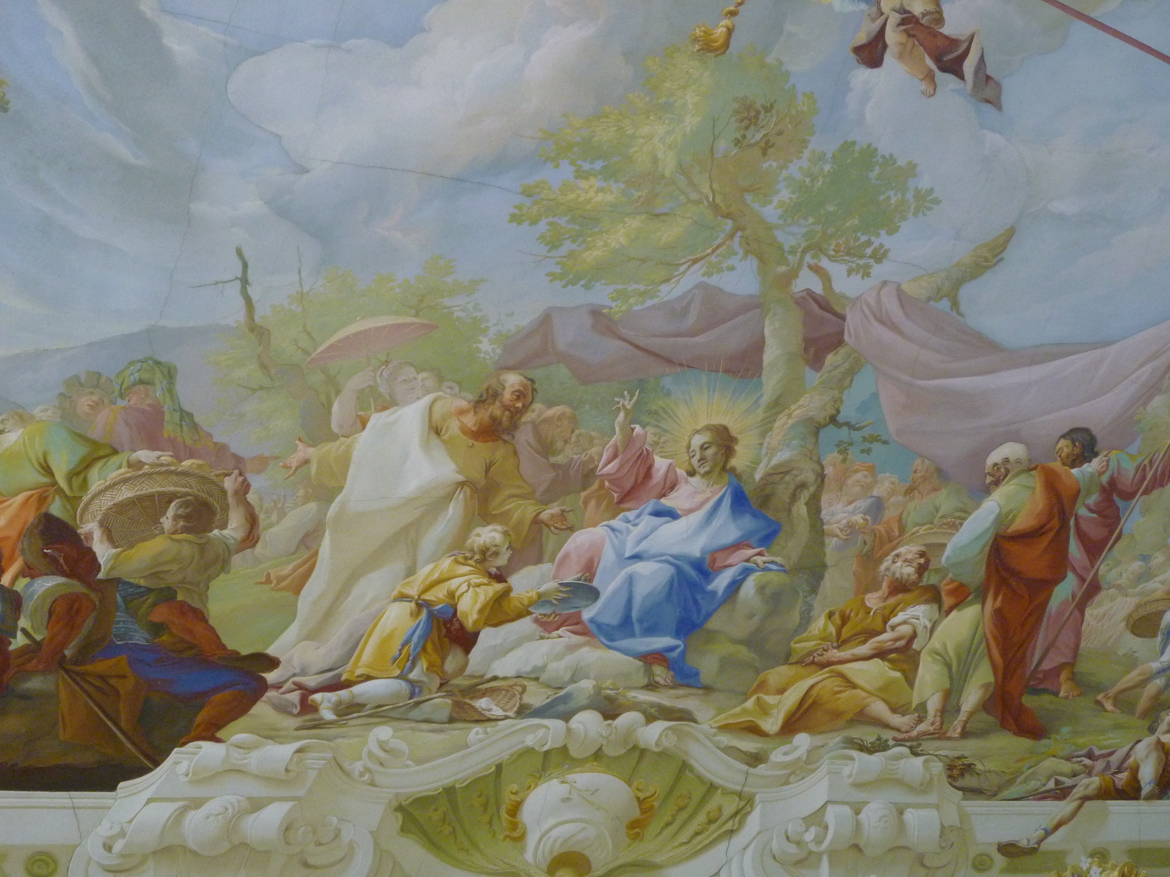 Deckenfresko im Marmorsaal des Stiftes Geras von Paul Troger (1738): die wunderbare Brotvermehrung